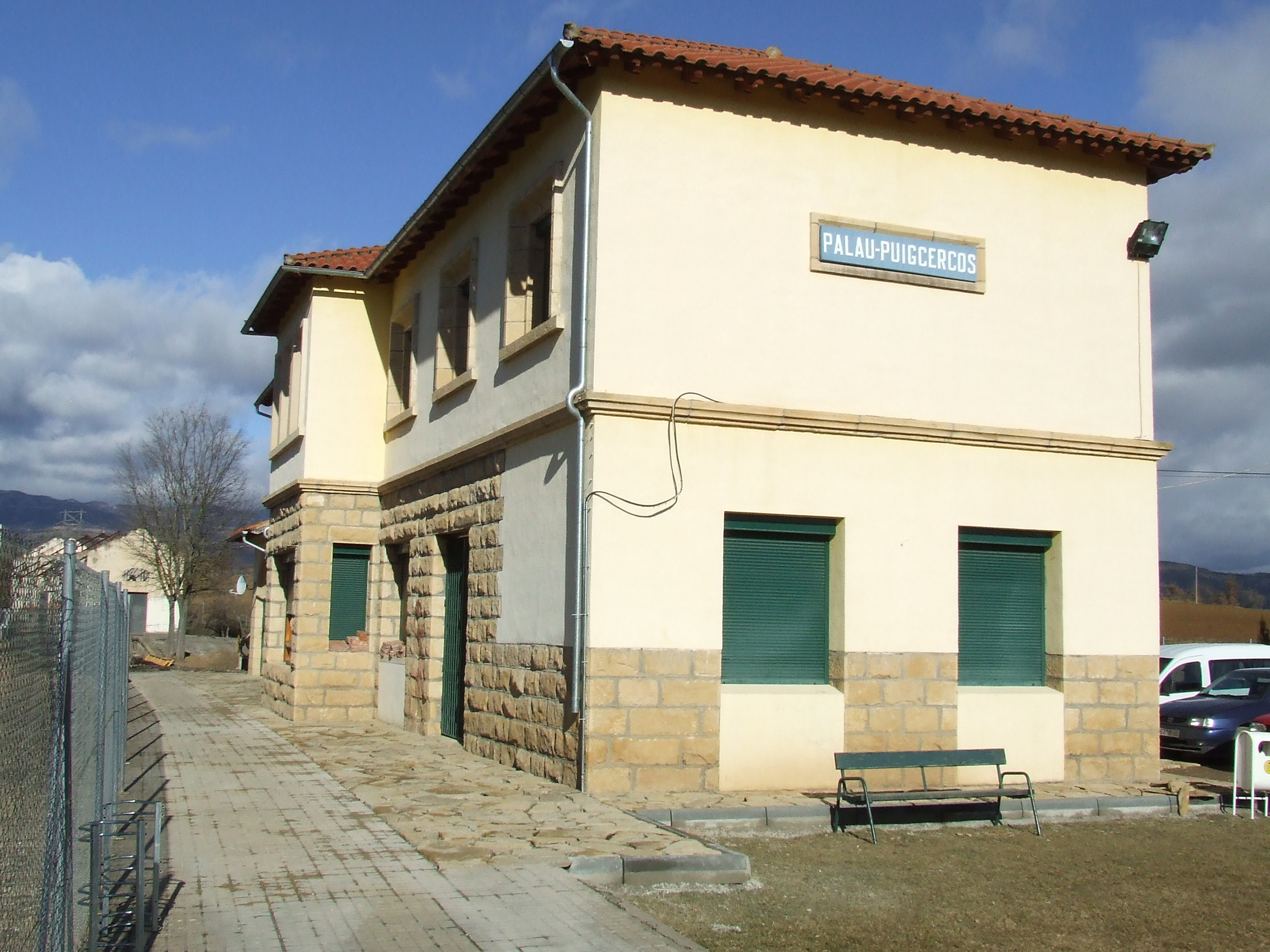 L'antiga estació de Palau-Puigcercós (Tremp, Pallars Jussà)